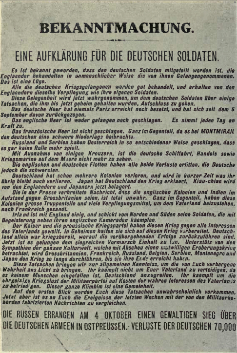 1.Weltkrieg, britische Propaganda 1914